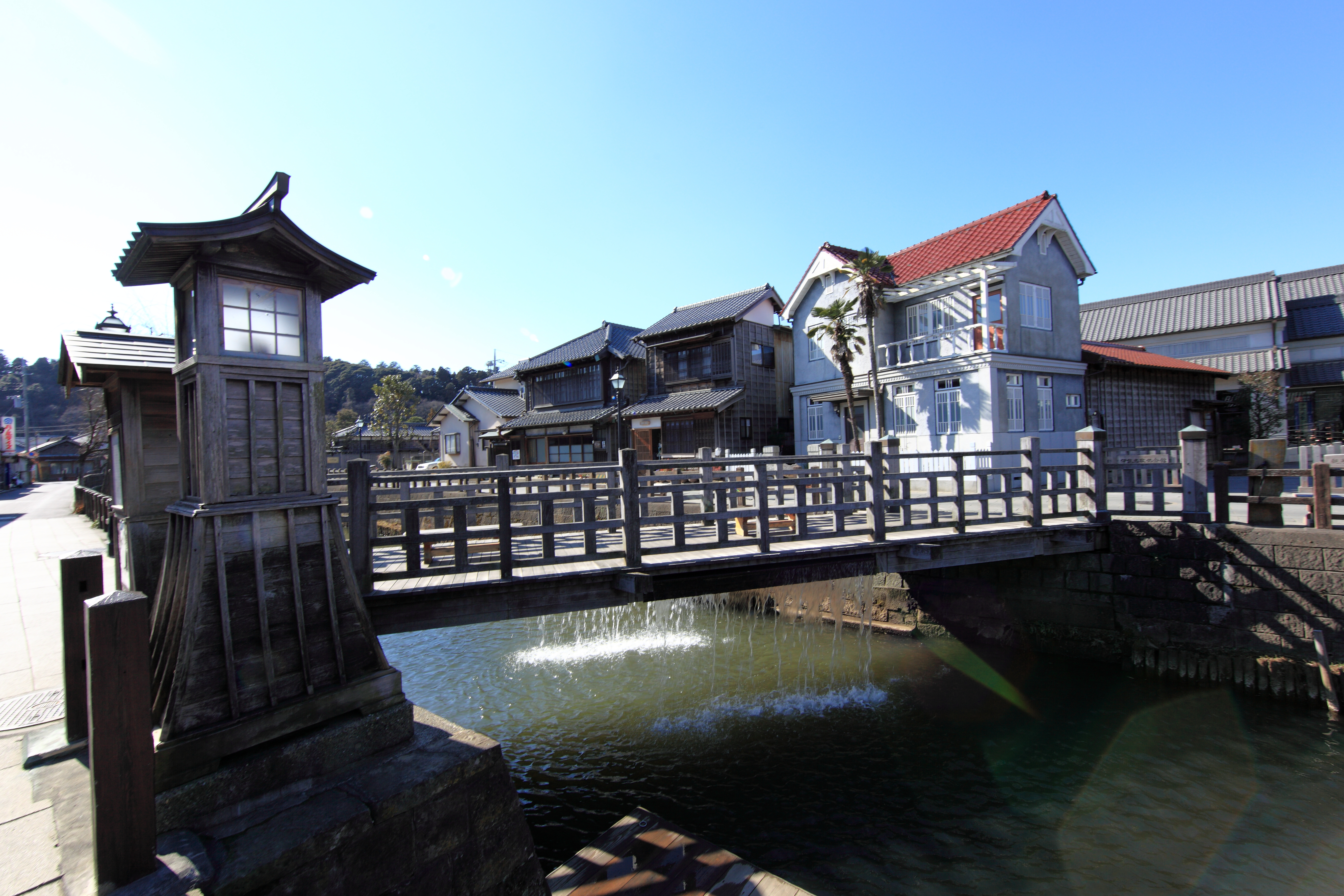 Sawara street, Katori-shi(city) Chiba-ken(Prefecture), Japan 千葉県香取市(ちばけん かとりし) 佐原街並み(さわら まちなみ) 樋橋（とよはし）